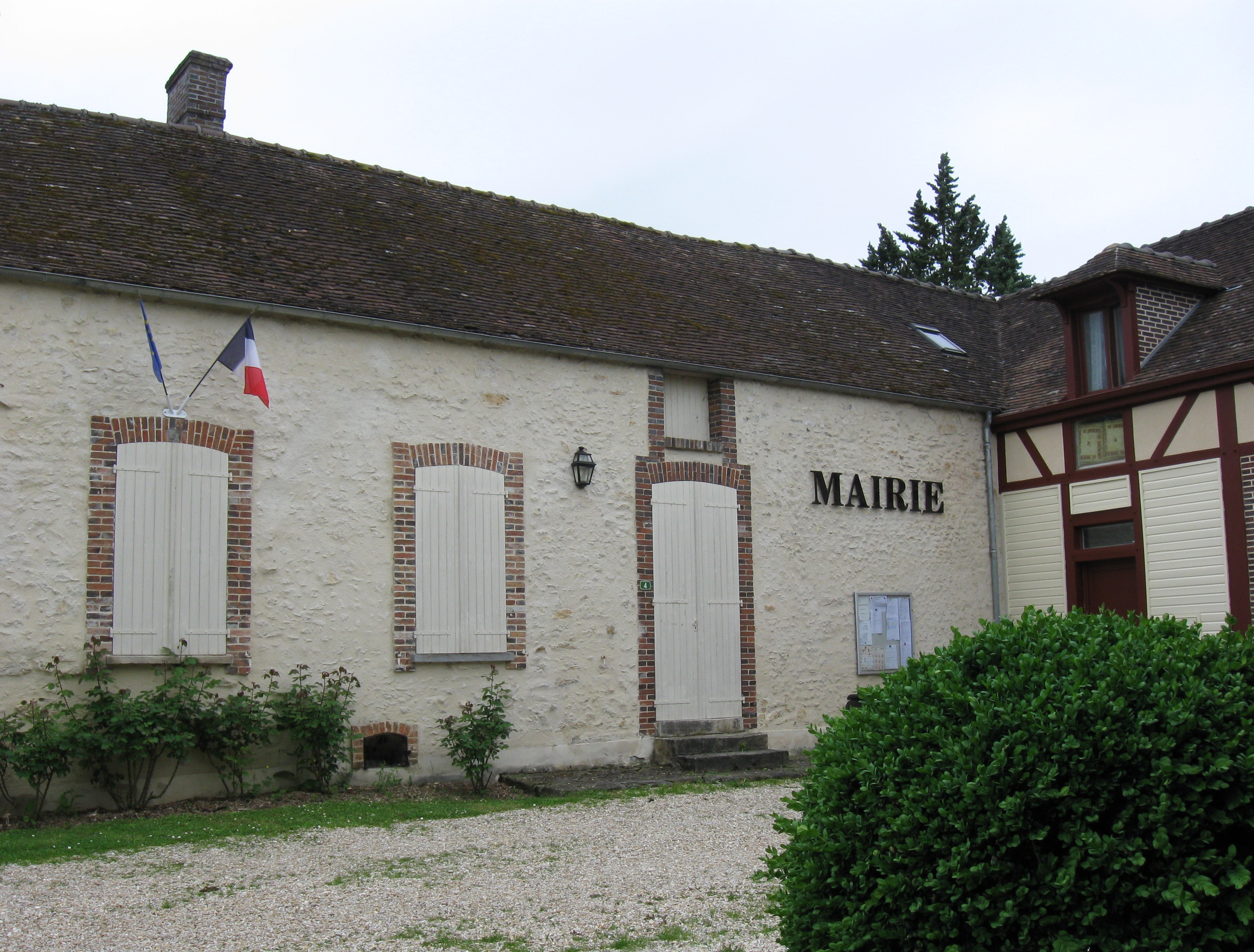 Mairie de Sigy. (Seine-et-Marne, région Île-de-France).